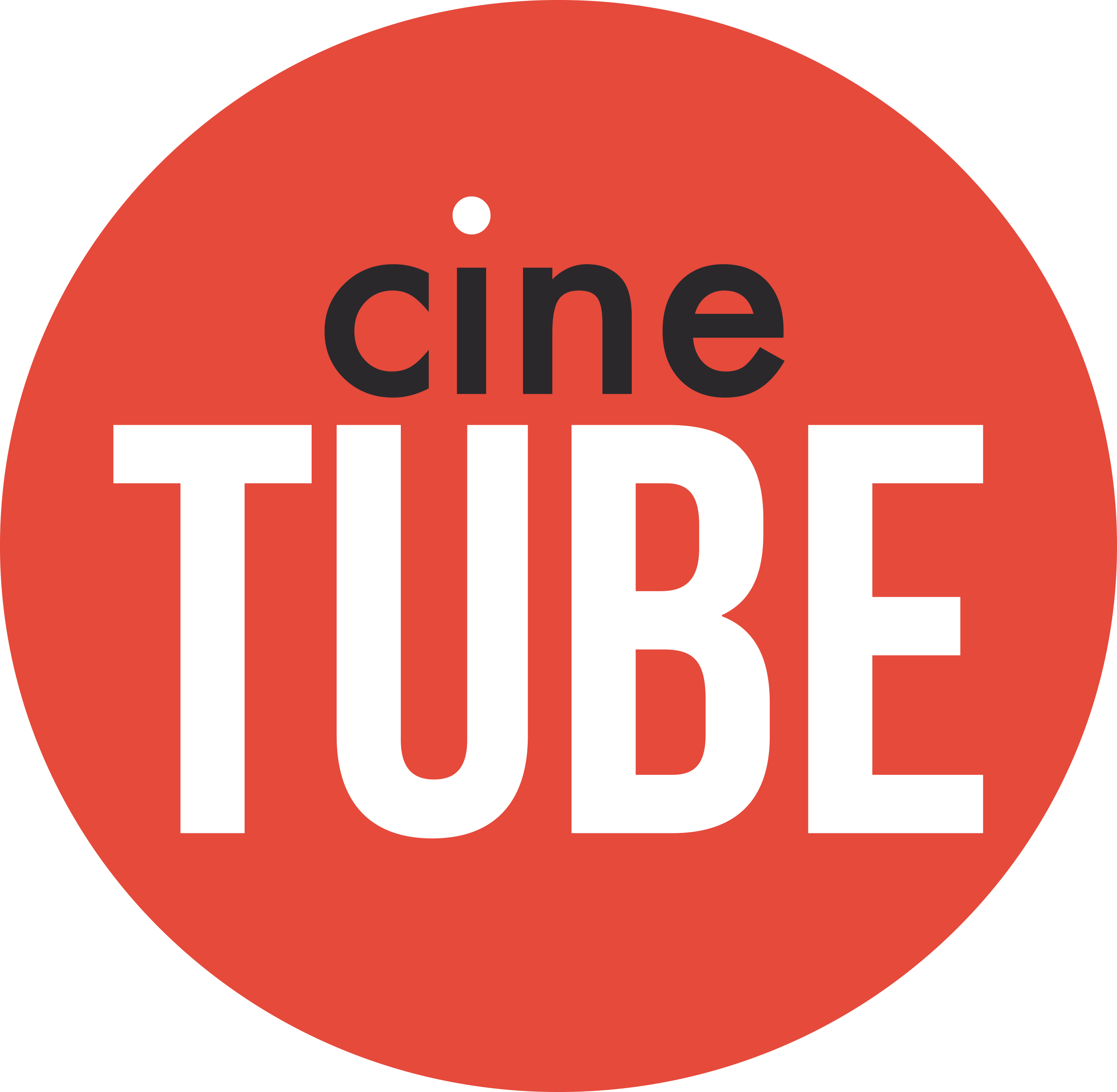 logo markusfilm